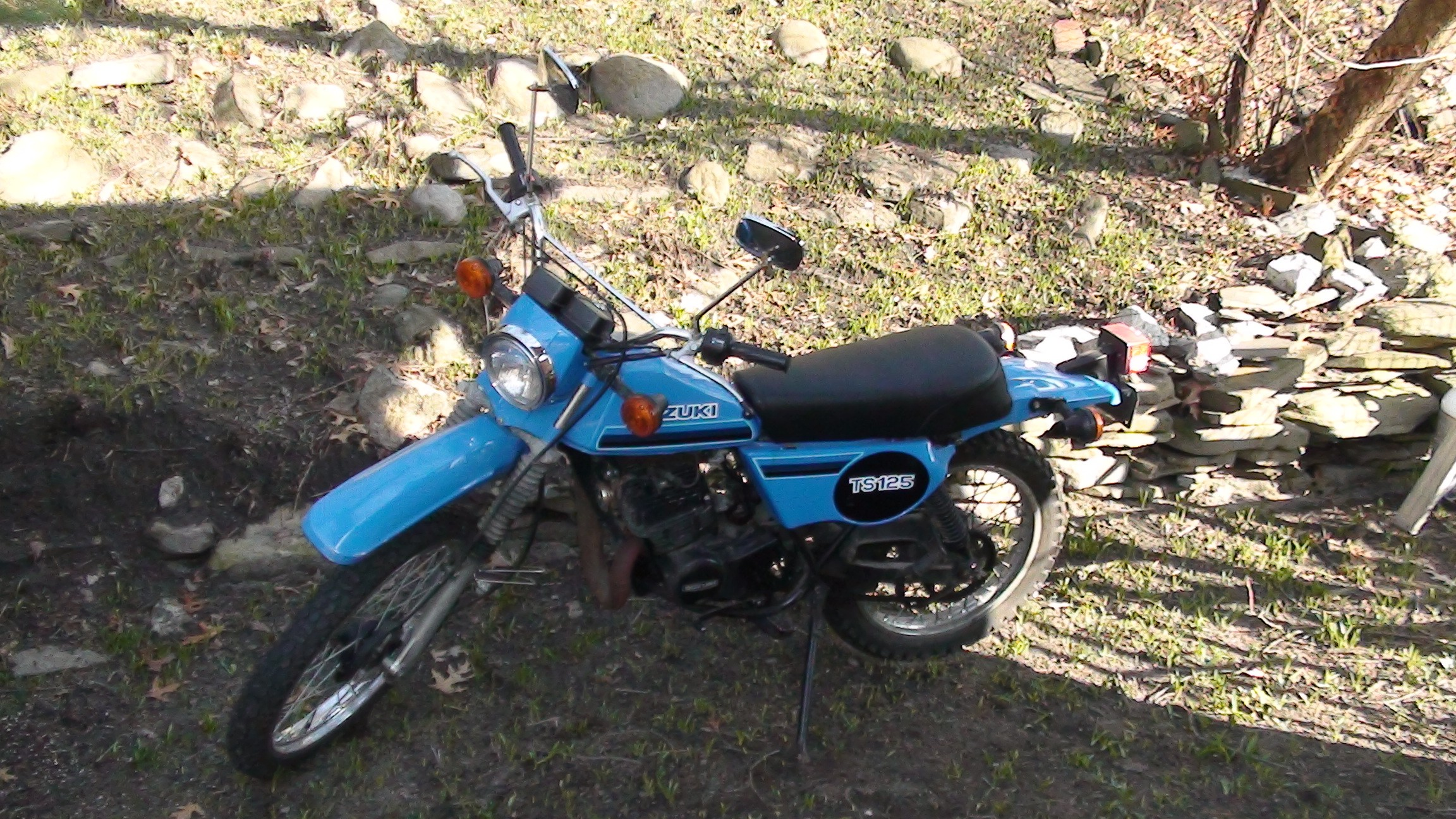 1981 Suzuki TS 125